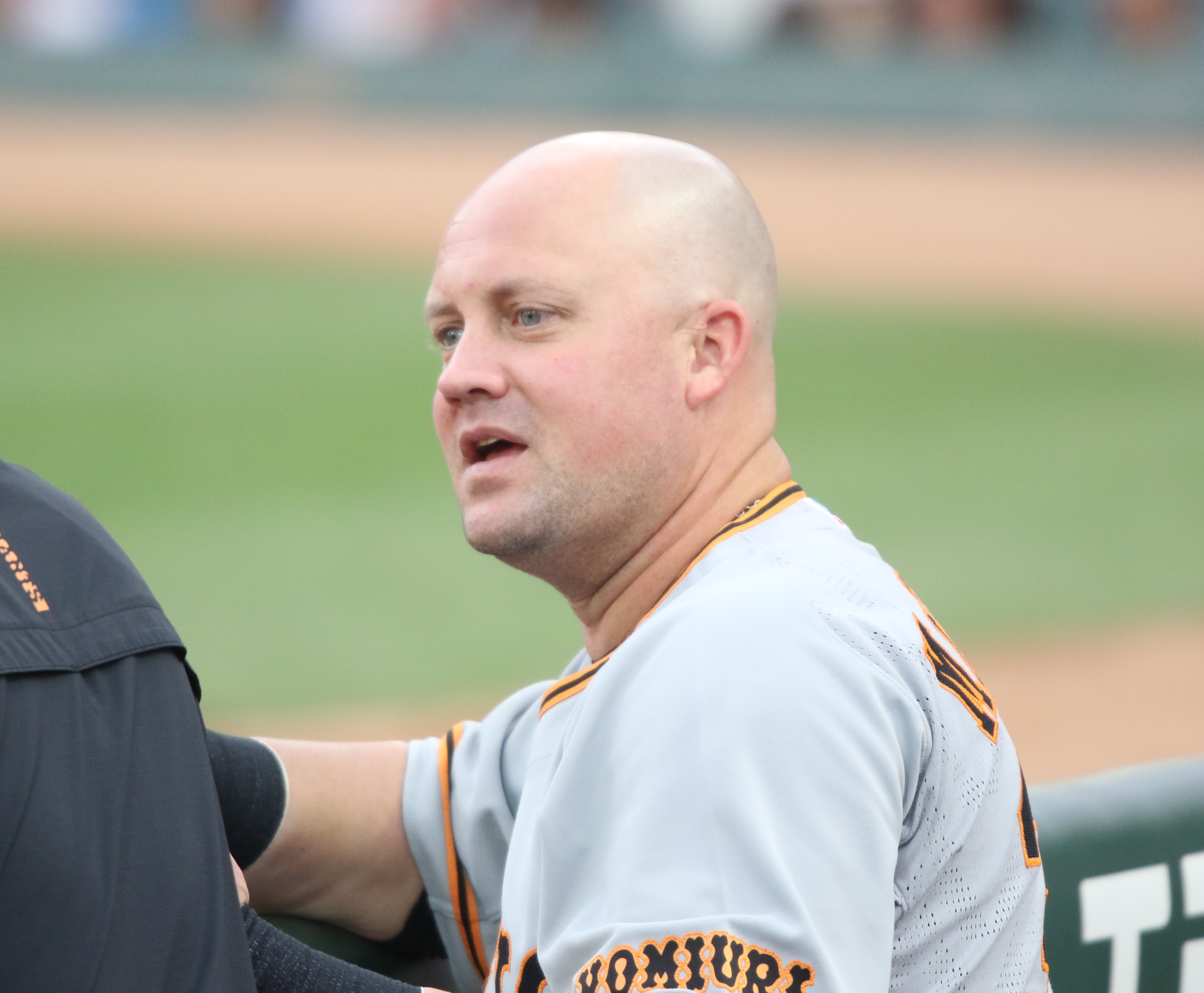 2018年6月28日 マツダスタジアム